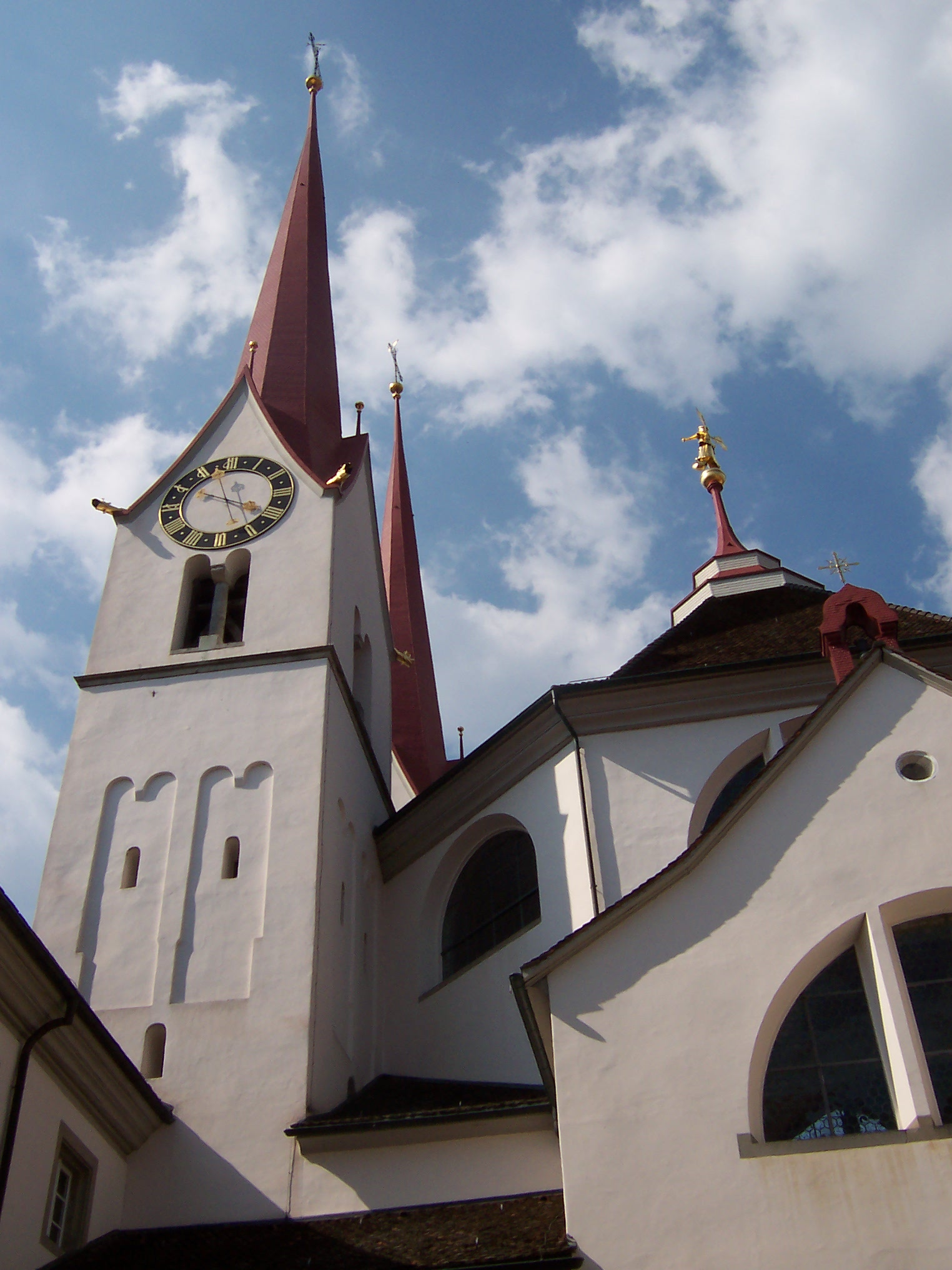 Klosterkirche in Muri (Südansicht), Kanton Aaargau, Schweiz.